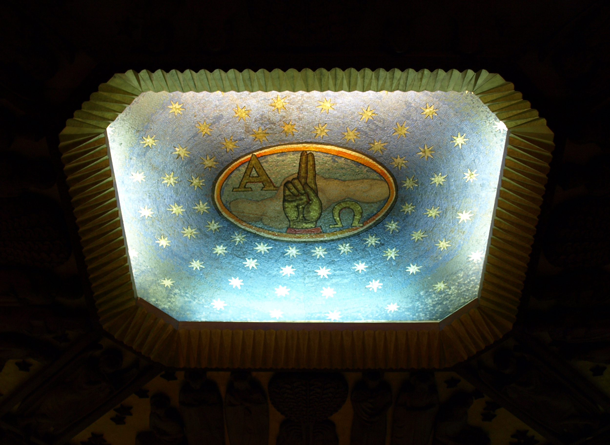 Capella del Bon Consell (Ajuntament de Barcelona)